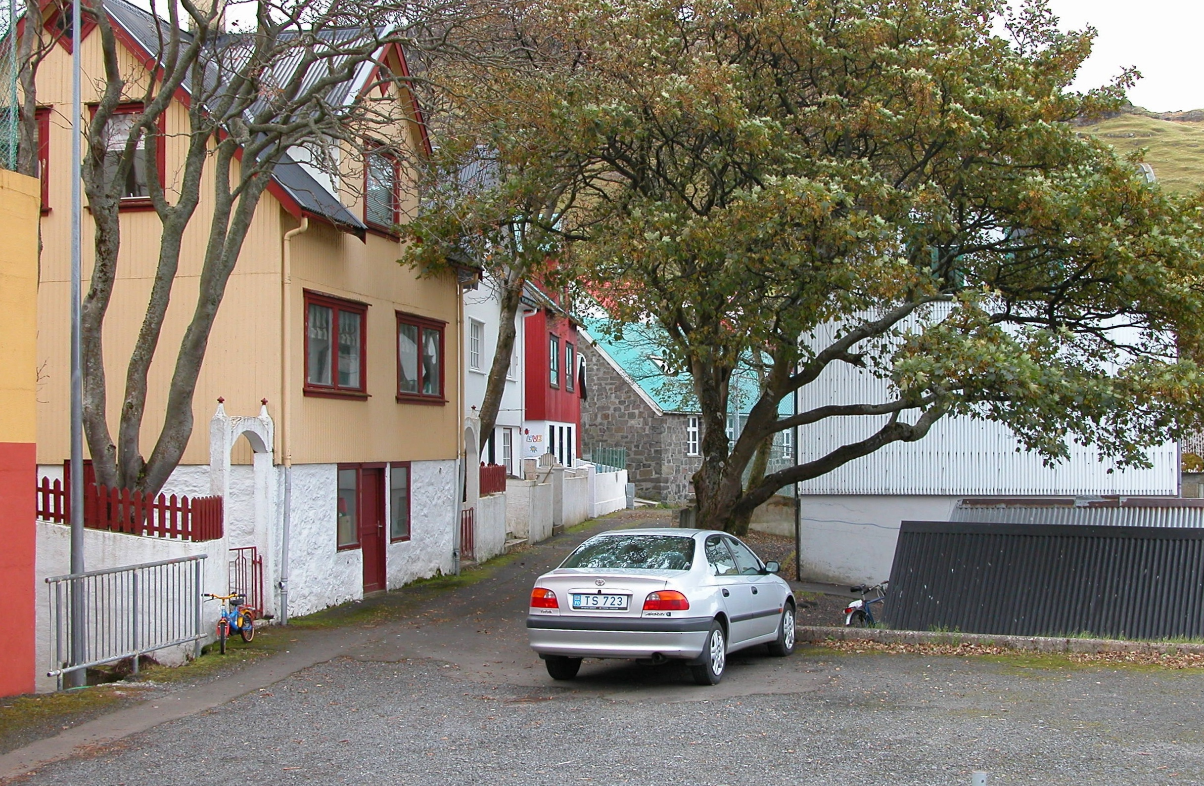 Haldarsvík on Streymoy, Faroe Islands